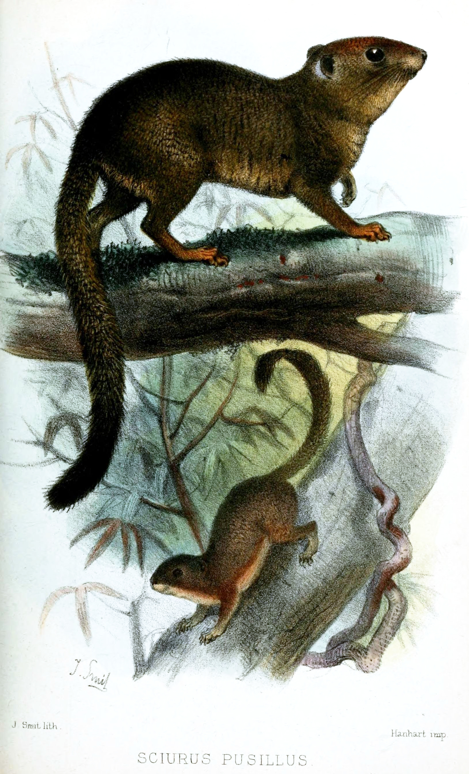 Sciurus pusillus = Sciurillus pusillus